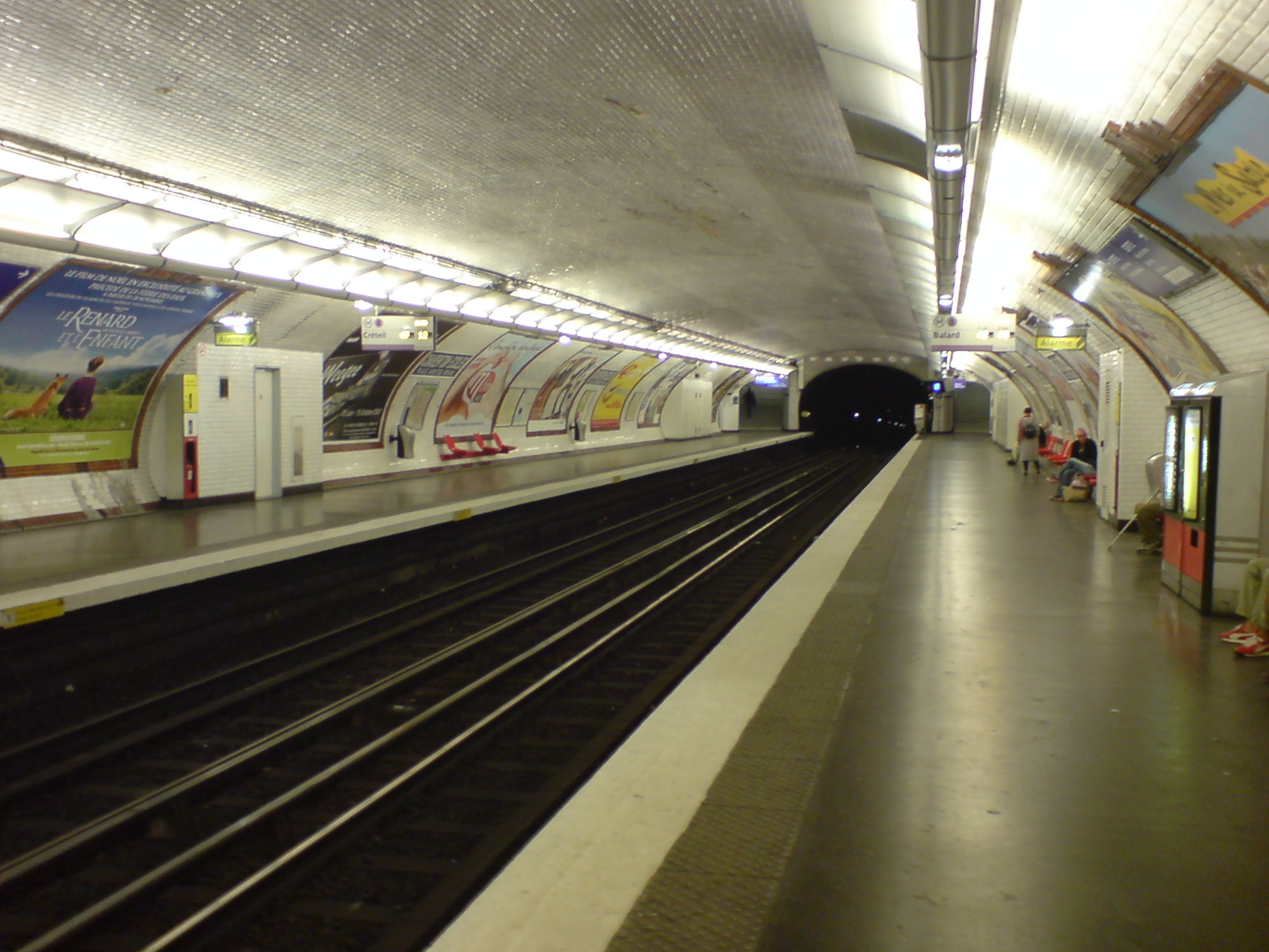 La estación de Metro más cercana al hotel